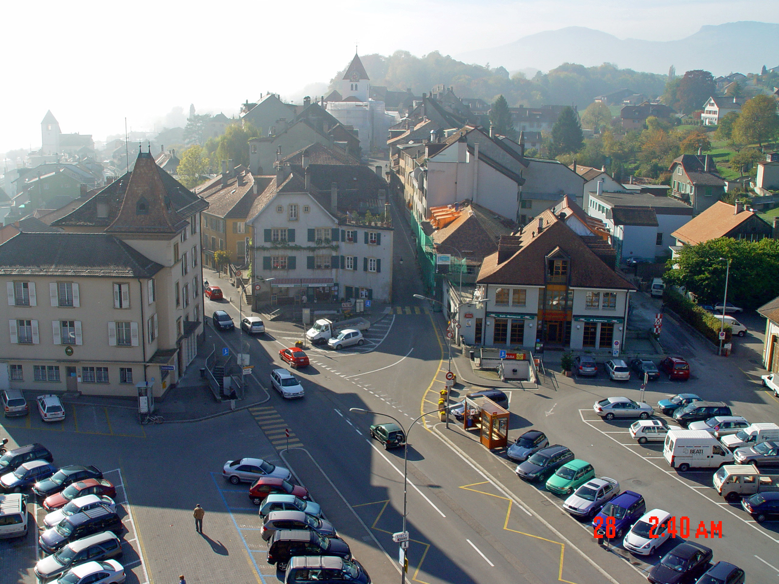 Ausblick auf Grandson vom Schloss